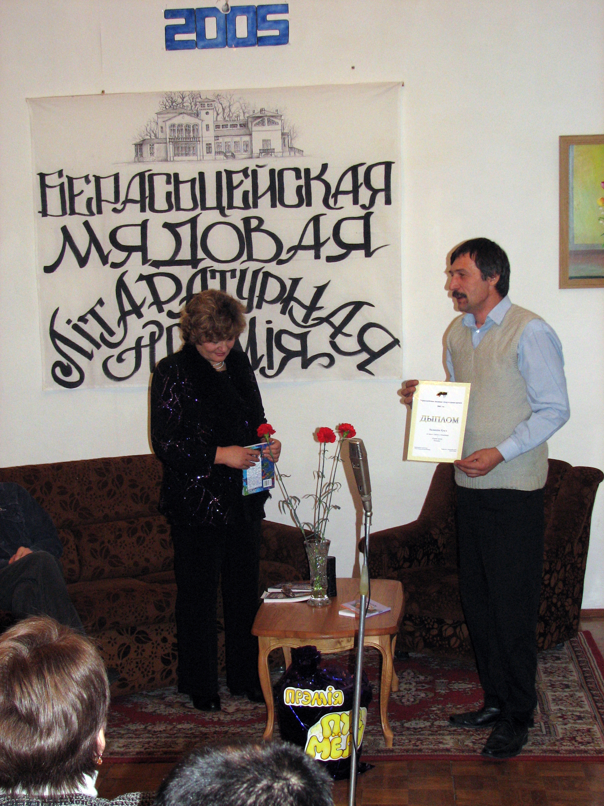 Беларуская (тарашкевіца): Мікола Папека ўручае Мядовую прэмію-2005 у Пружанскім палацыку